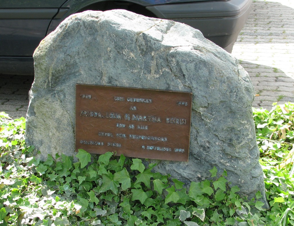 Gedenkstein in Brühl